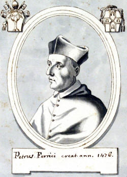 Cardenal Pedro Ferriz